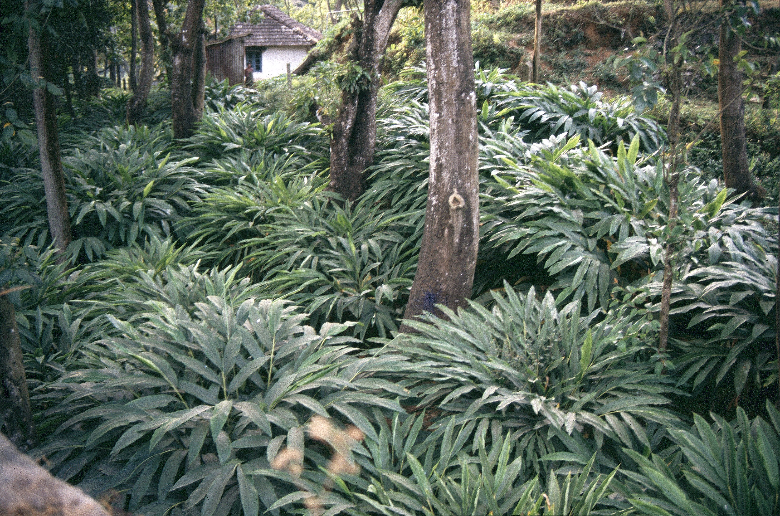 Kardamompflanzen